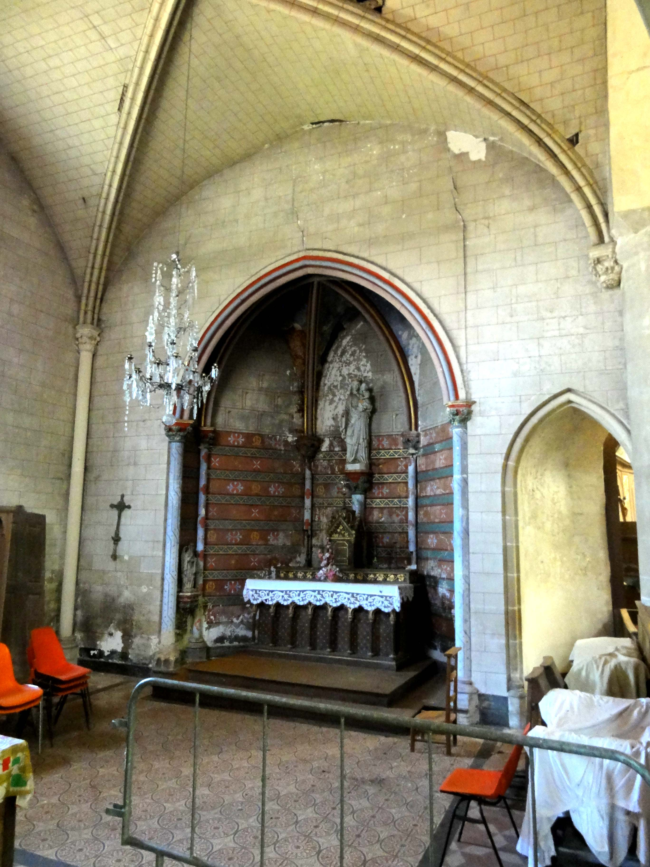 Intérieur de l'église (voir titre).